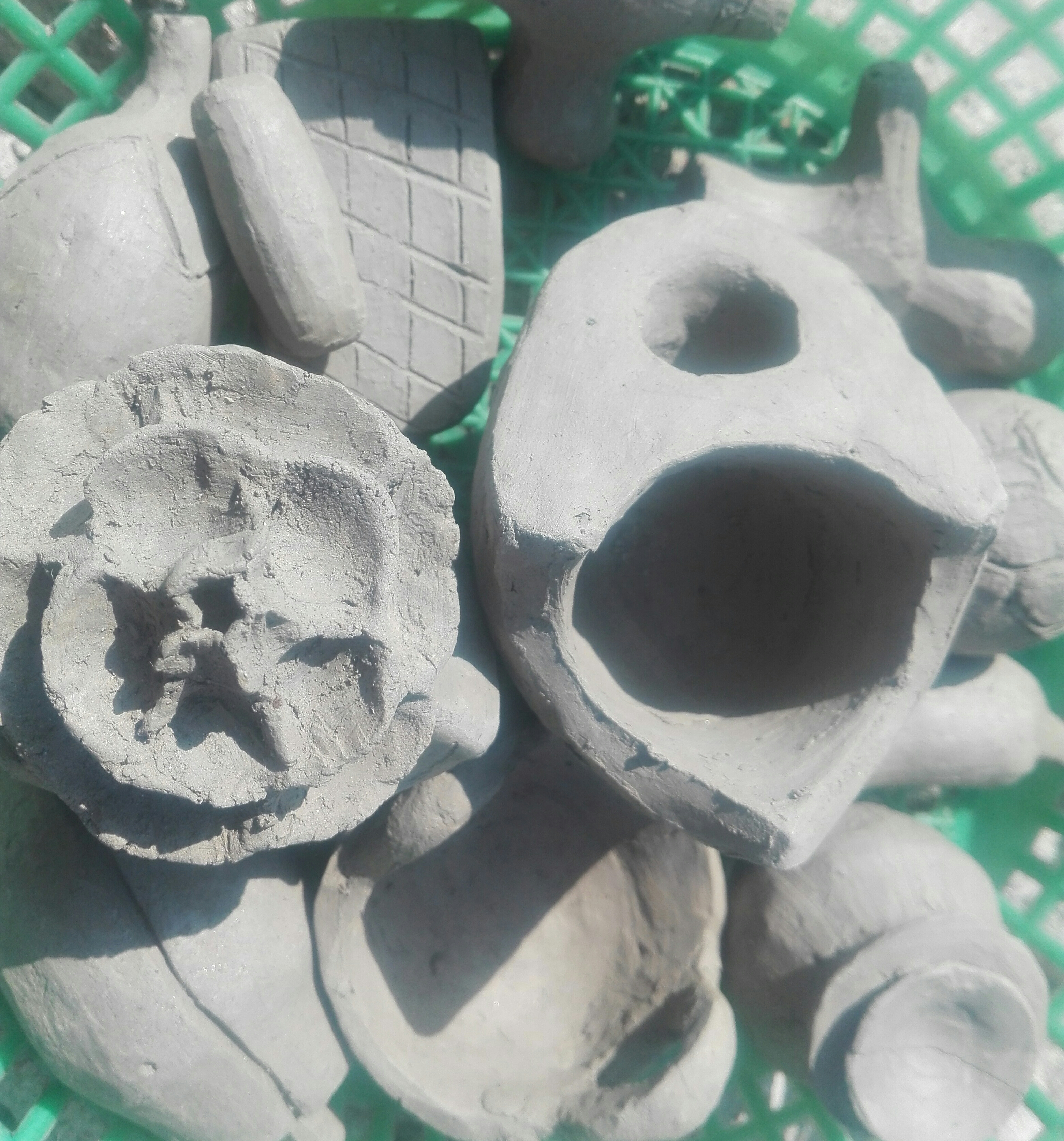 clay made toys, Khulna, Bangladesh